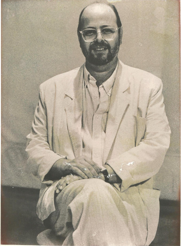 Ángel Ruggiero